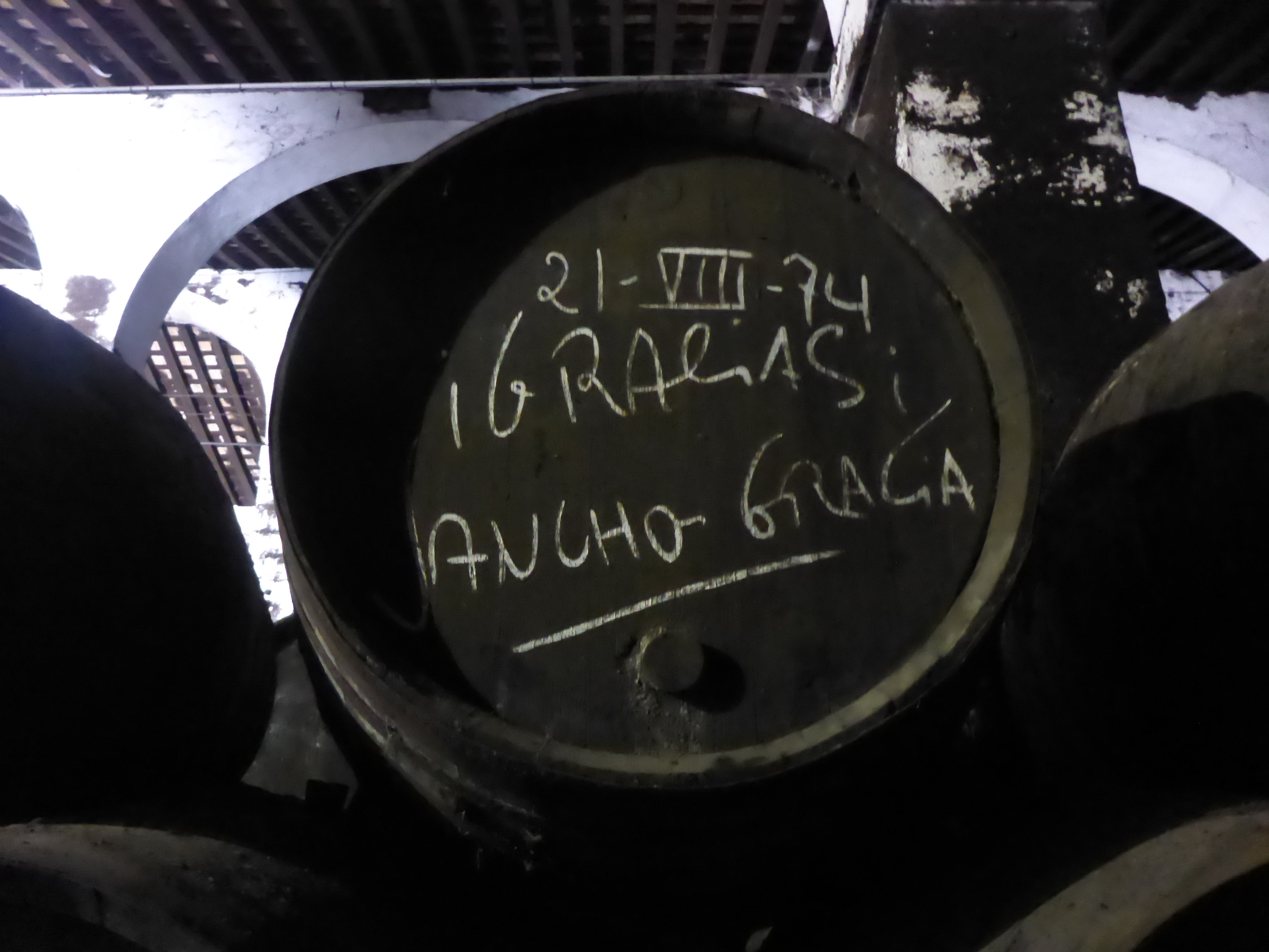 Bodegas Domecq-Fundador en Jerez de la Frontera (España)